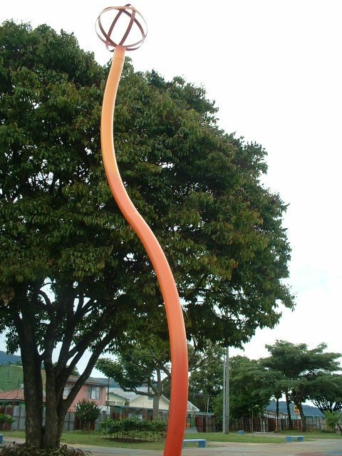 Detalle del Parque de Hatillo Centro en el distrito de Hatillo en la ciudad de San José, Costa Rica.